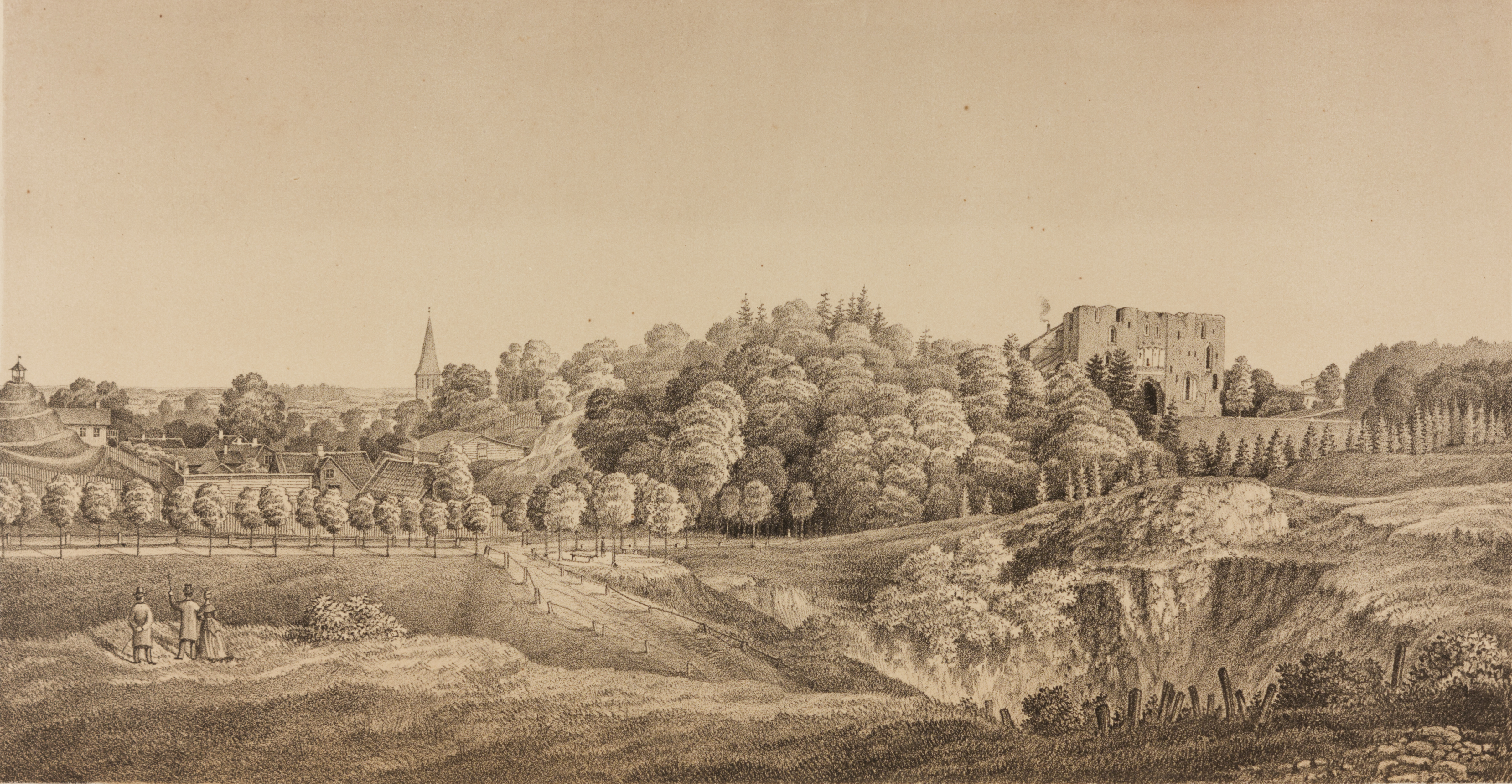 "Vaade Tartule Kassitoomelt" (1869). Litograafia. Kujutise kõrgus 16,1 ja laius 31,2 cm, lehe kõrgus 16,7 ja laius 31,7 cm. This image on crowdsourcing geotagging platform Ajapaik MUIS:TKM TR 4102 G 1306